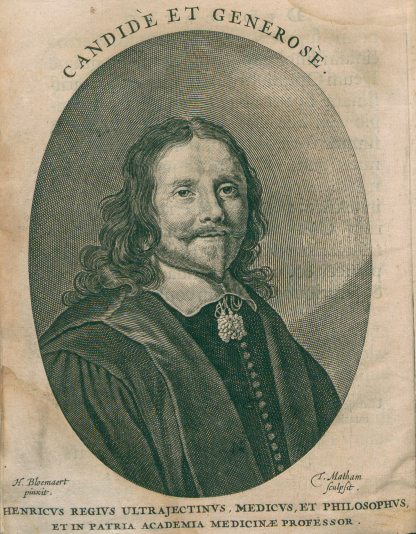 Ritratto dell'autore